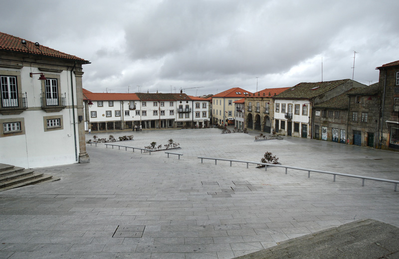 Square in Guarda, Portugal